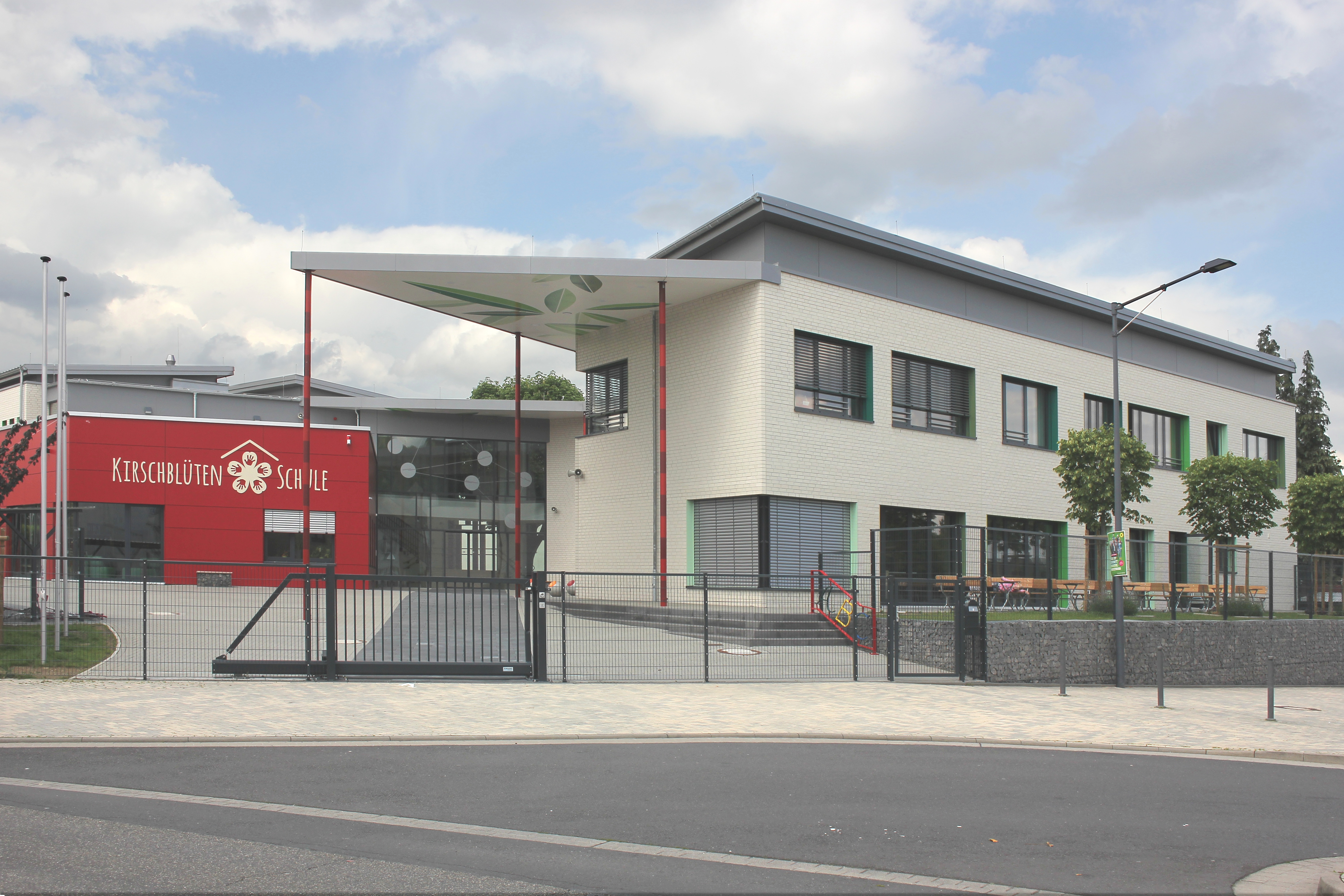 Kirschblütenschule Mülheim-Kärlich = Grundschule des Stadtteils Mülheim, erbaut 2016/17